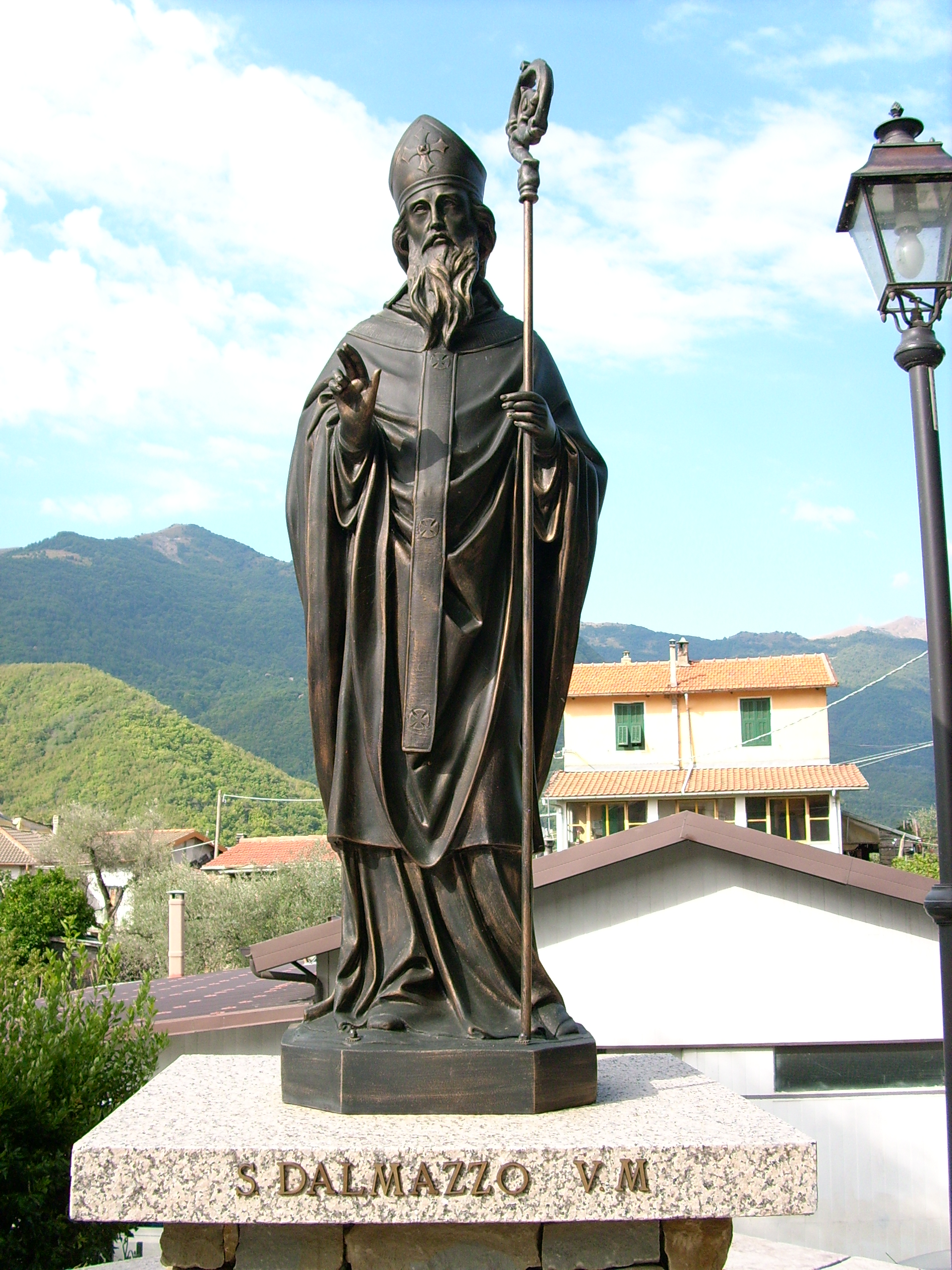 Statua di san Dalmazio presso Pornassio, Liguria, Italia.